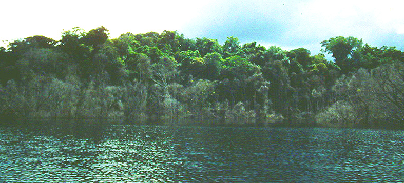 Photos prises sur le fleuve Sinnamary ou ses berges lors de la fin de la montée des eaux induites par le barrage EDF de Petit saut, en Guyane, en décembre 1995. De très nombreux arbres dont le système racinaire n'est normalement pas immergé sont morts noyés.